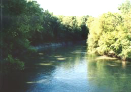 Rivière L'Anguille (Arkansas, Etats-Unis)